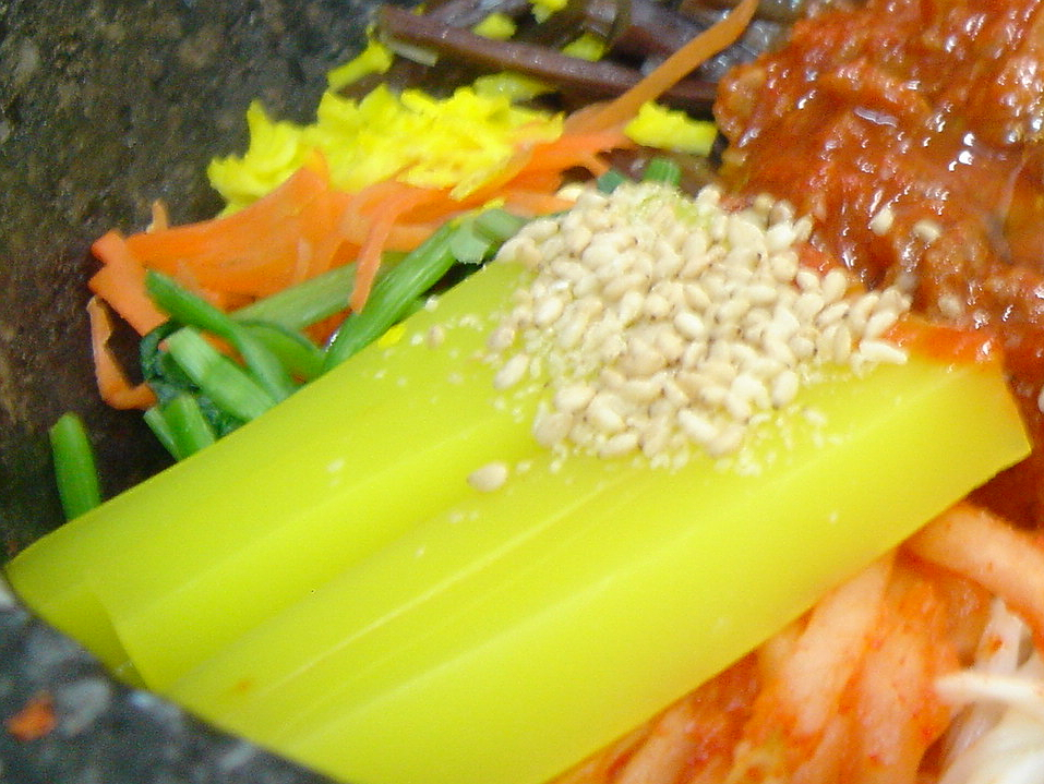 Jeonju bibimbap, a Korean dish